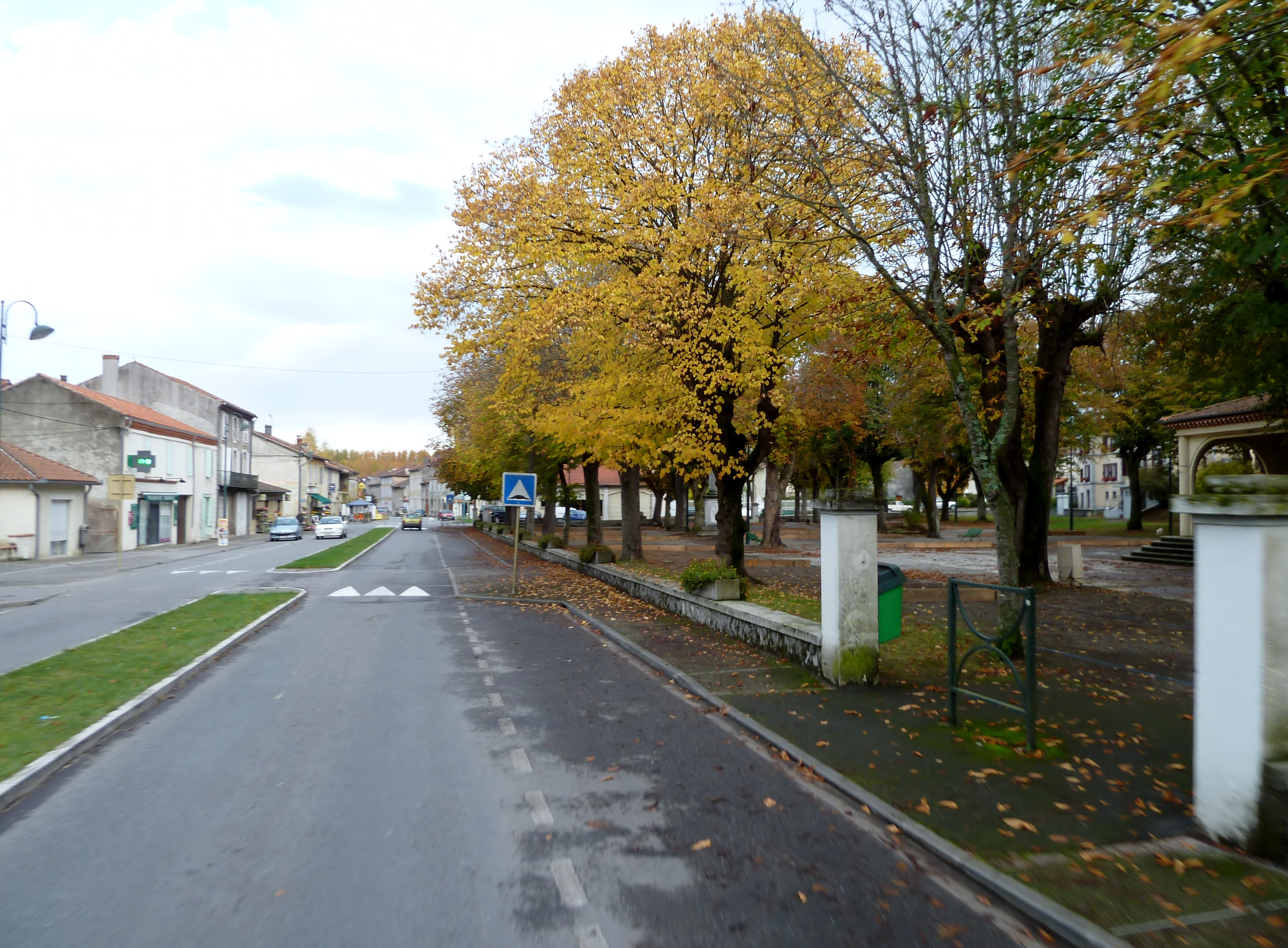 Labarthe-Rivière